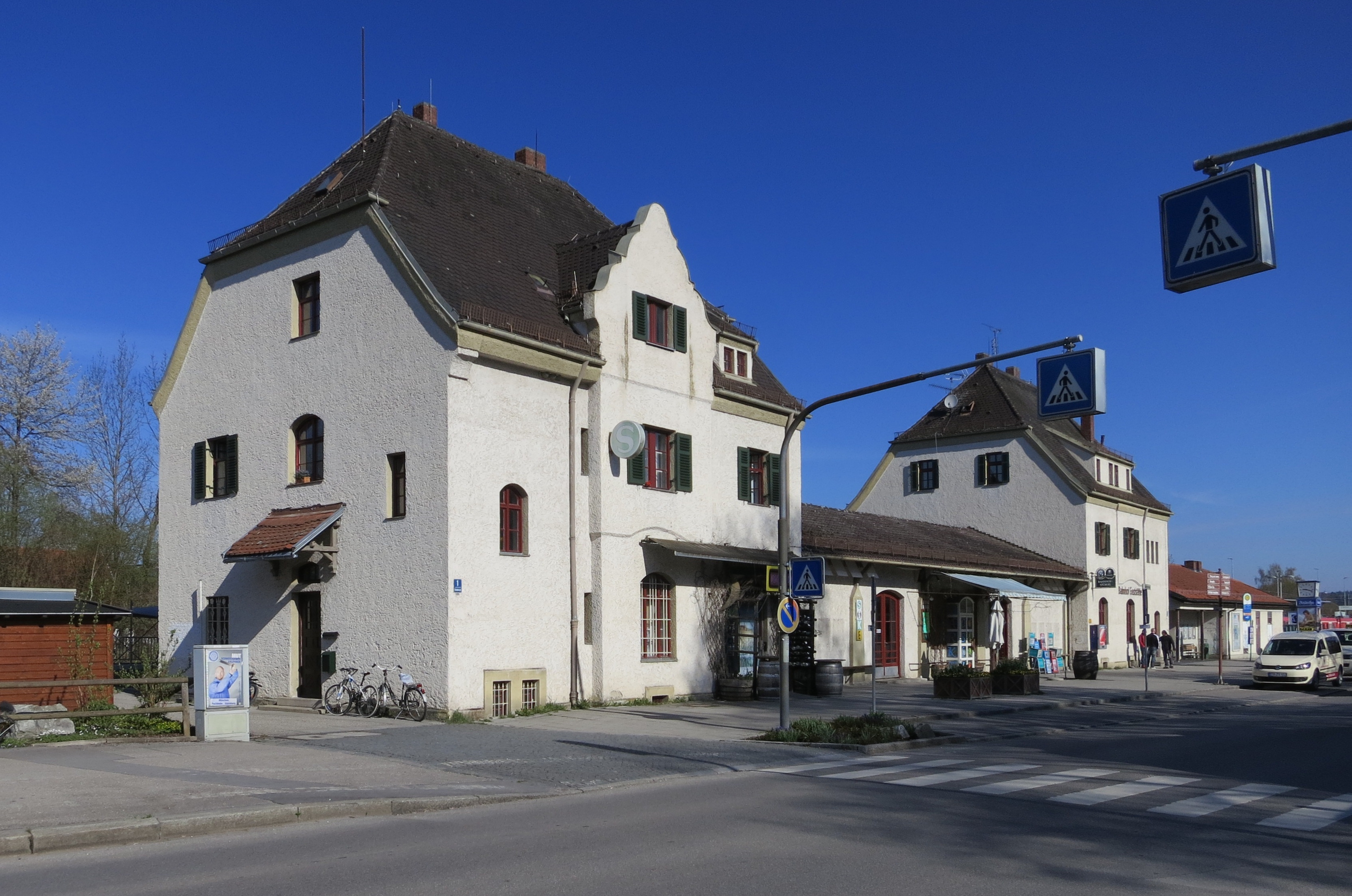 1903 errichtetes Empfangsgebäude des Bahnhofs Herrsching von der Straßenseite This is a photograph of an architectural monument.